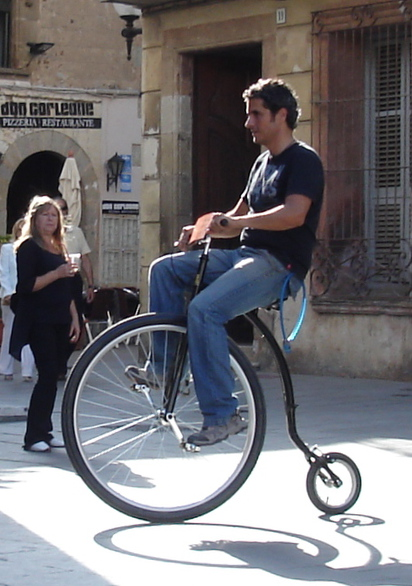 Velociped, în Calella, Catalonia